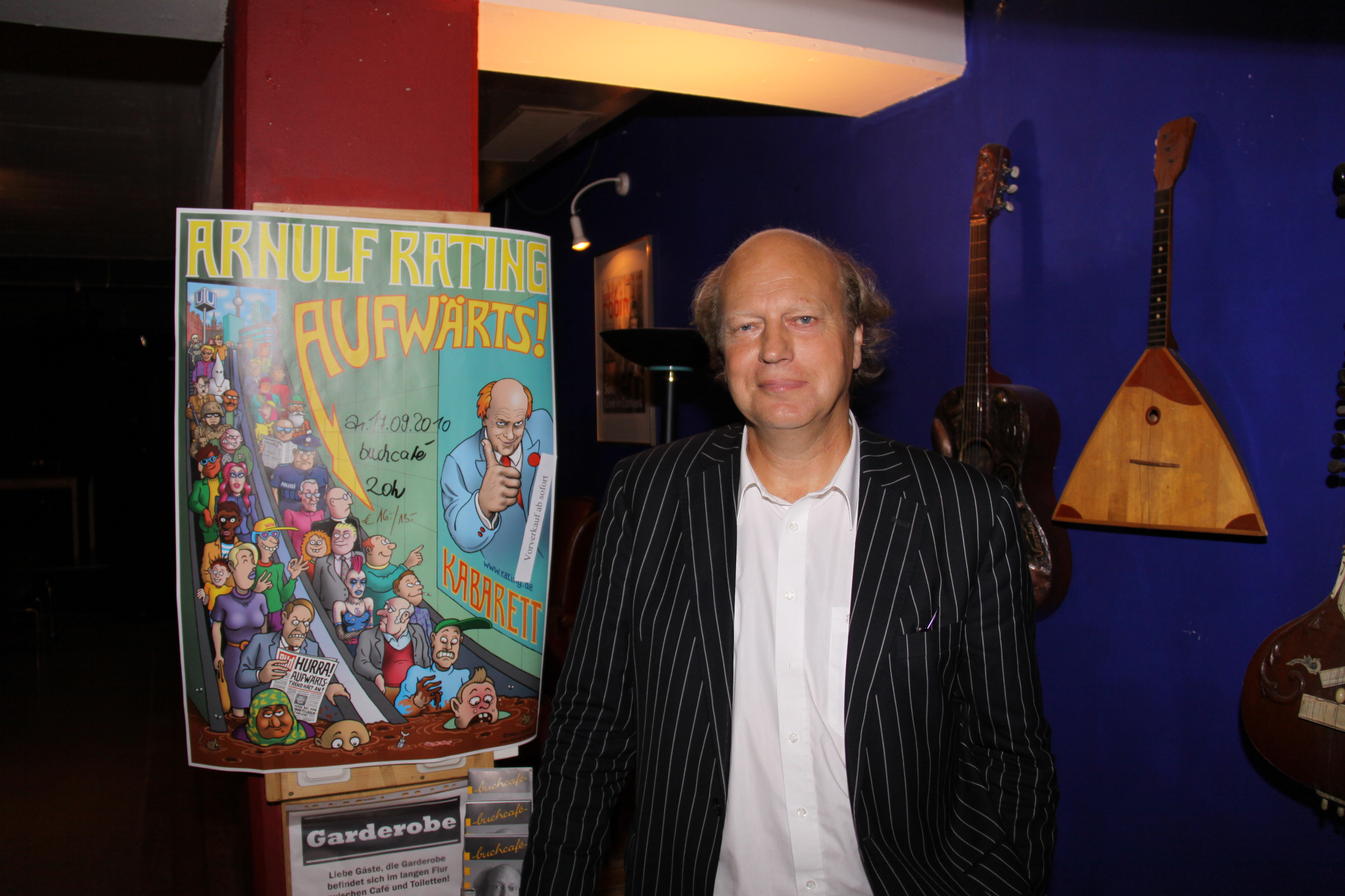 Arnulf Rating nach seinem Bühnenprogramm "Aufwärts!" im Buchcafé in Bad Hersfeld